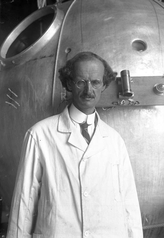 Der bekannte Höhenforscher Professor Piccard, bereitet sich in der Schweiz auf seinen neuen Stratosphärenflug vor ! Vorbereitungen zu dem neuen Höhenflug Prof. Piccards ! Prof. Piccard der wagemutige Höhenforscher, welcher auf seinem neuen Flug in die Stratosphäre eine Höhe von über 18 000 m erreichen will.